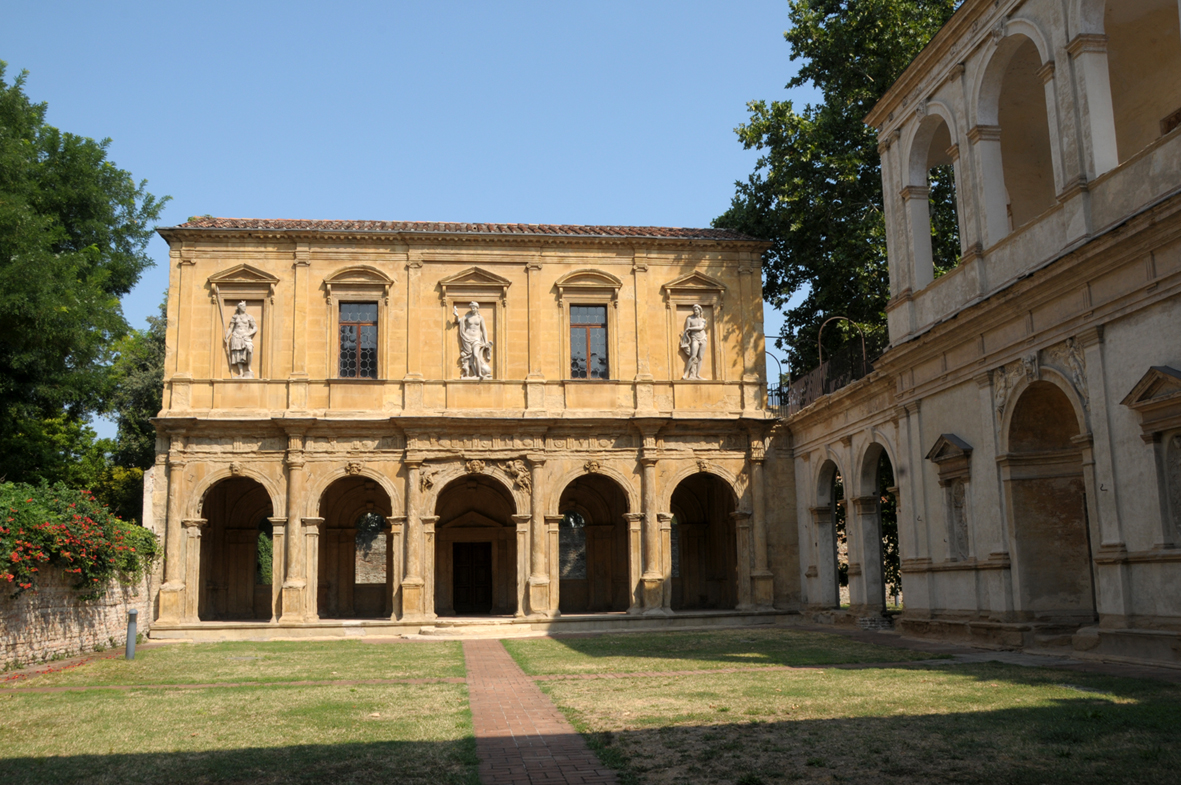 Loggia e Odeo Cornaro This is a photo of a monument which is part of cultural heritage of Italy.